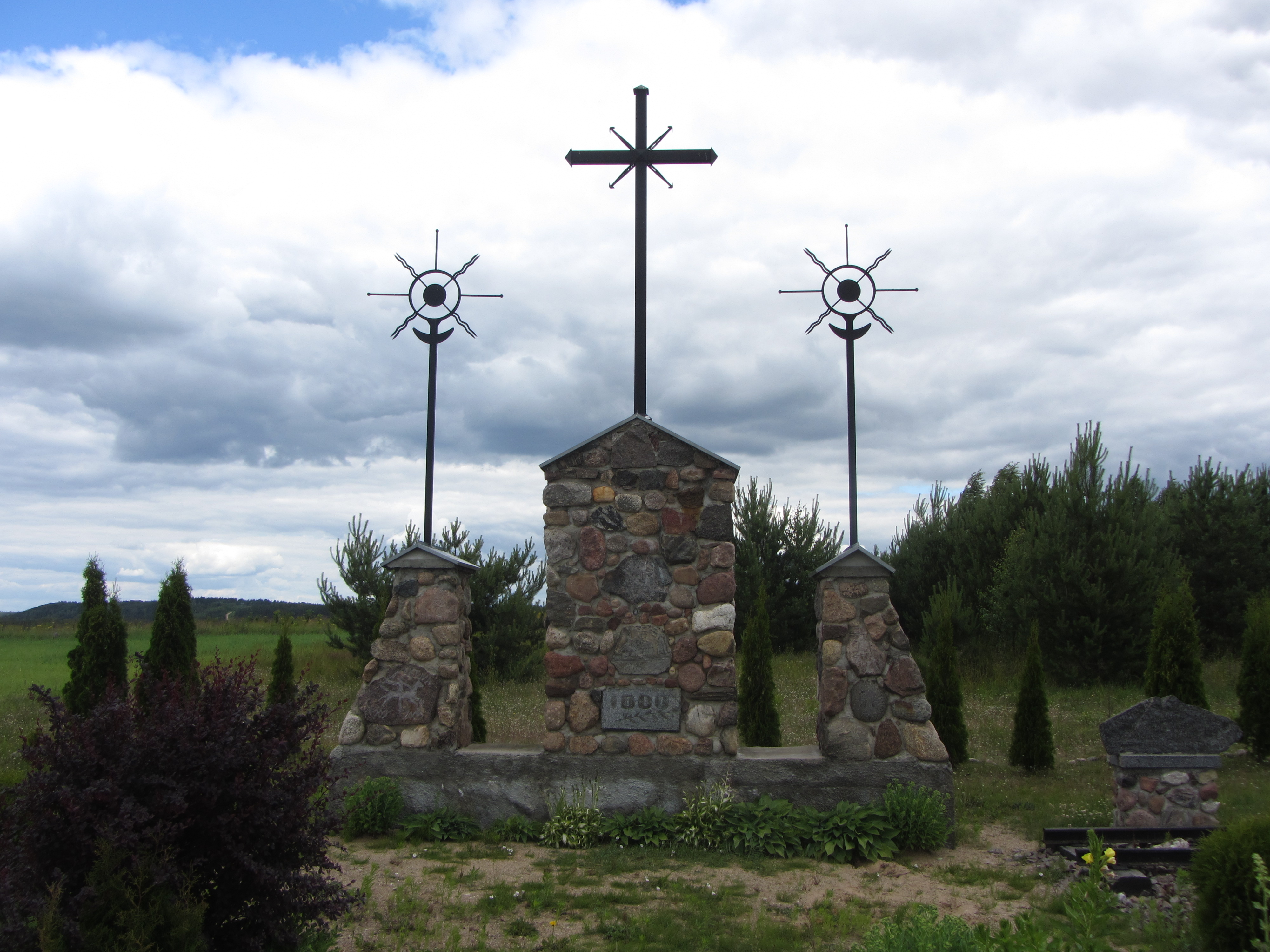 Reškutėnai 18204, Lithuania